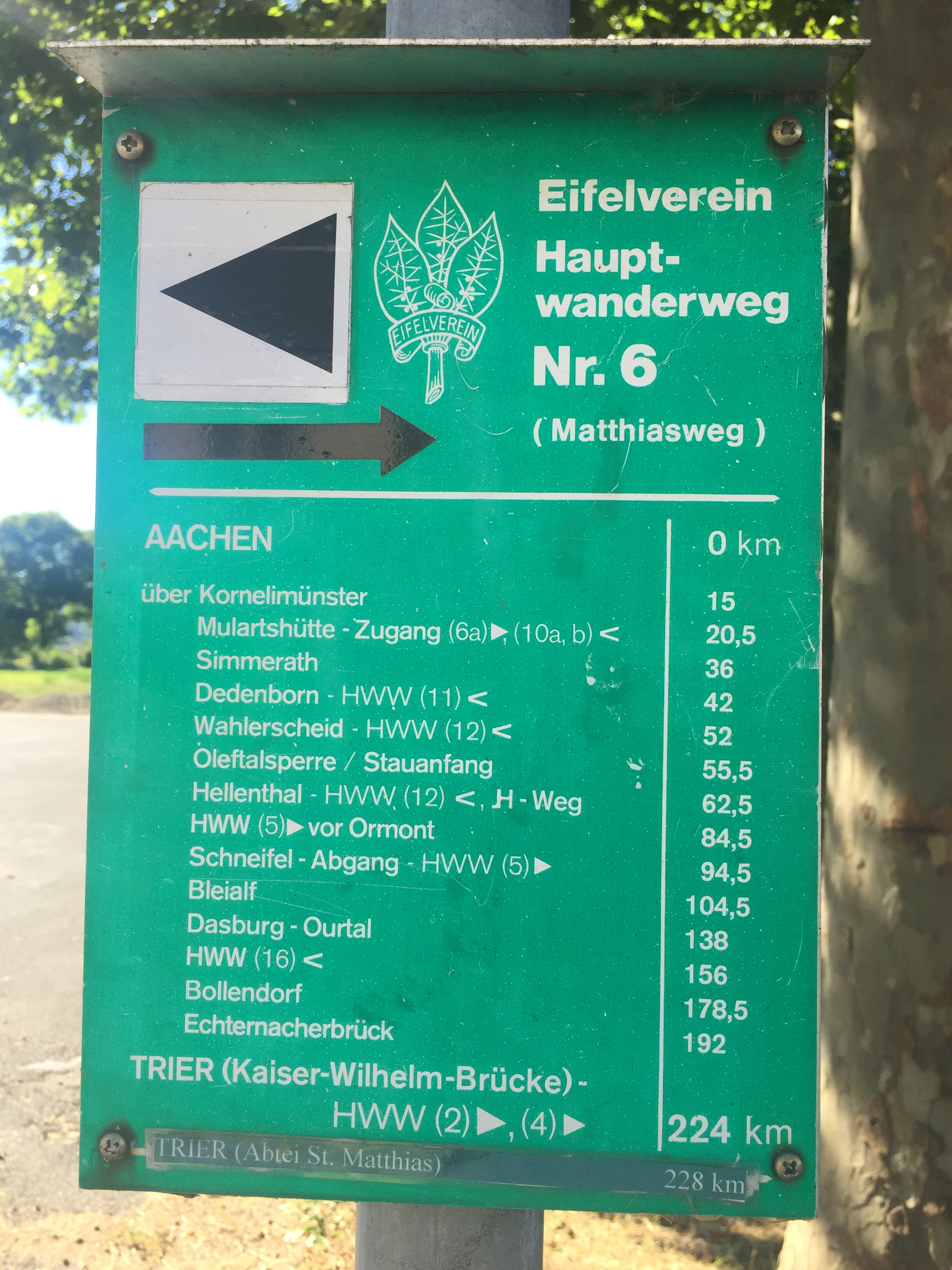 Cartel del camino de Matías junto a la abadía benedictina de San Matías.